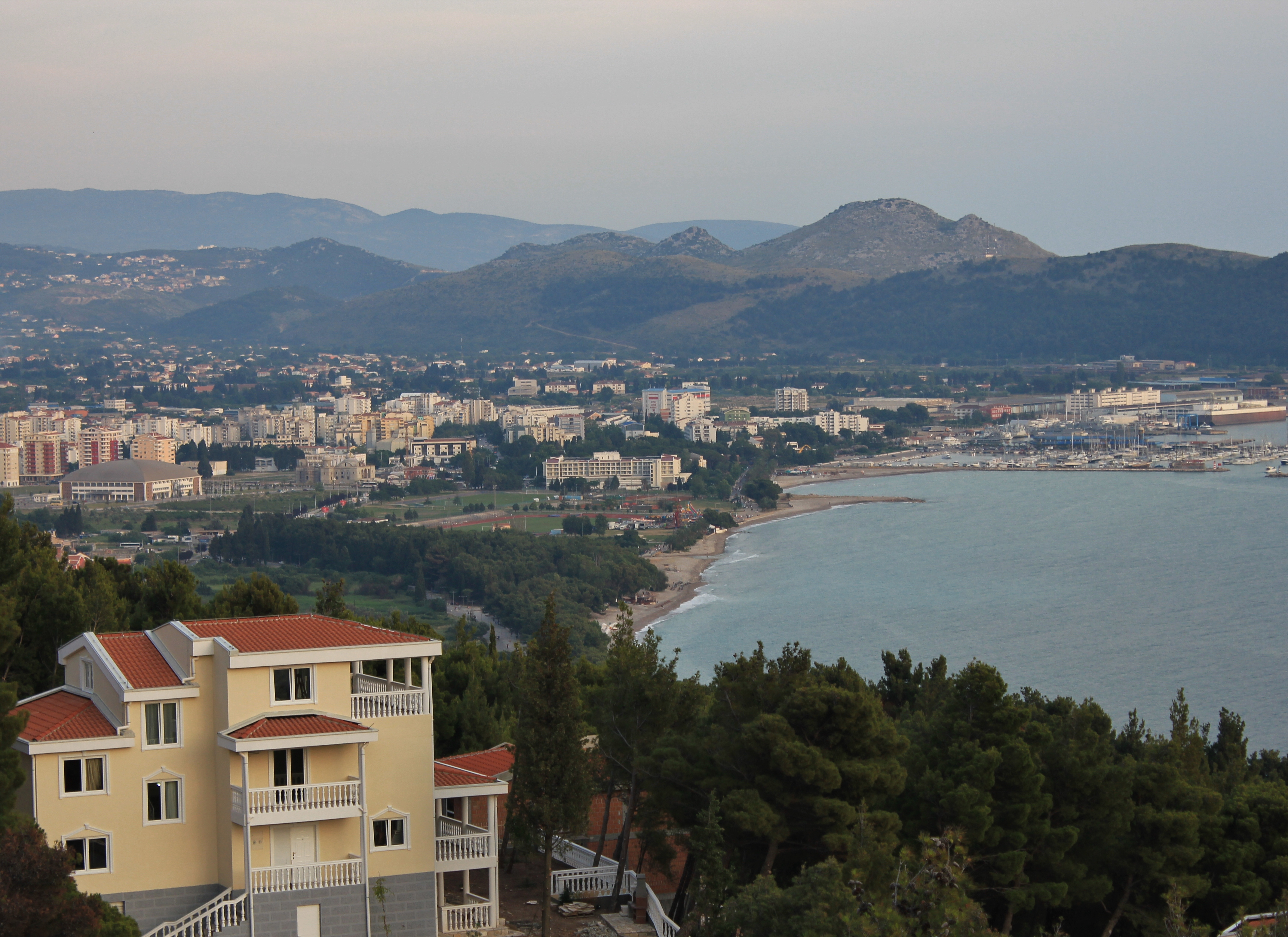 Bar